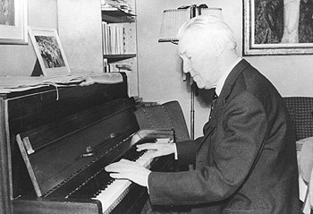 Juhan Aavik